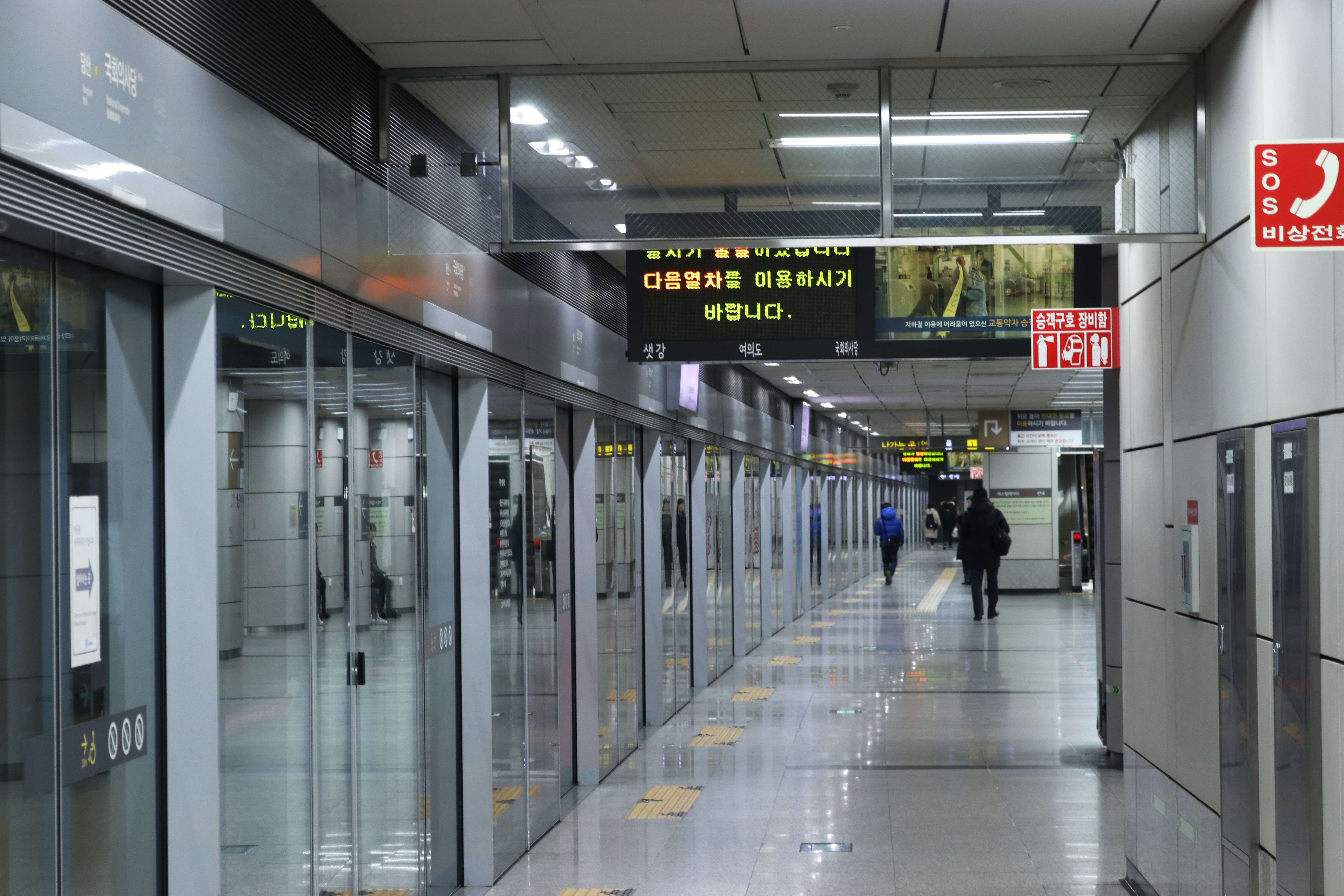 국회의사당역 승강장